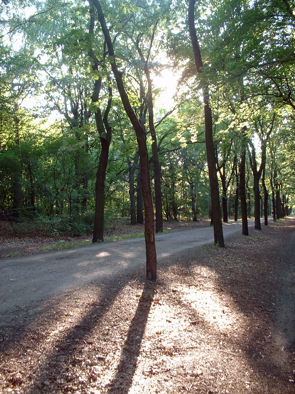 Das Bild zeigt den Hauptweg des Volksparkes Wuhlheide in Berlin, der beinahe den gesamten Wald durchzieht.